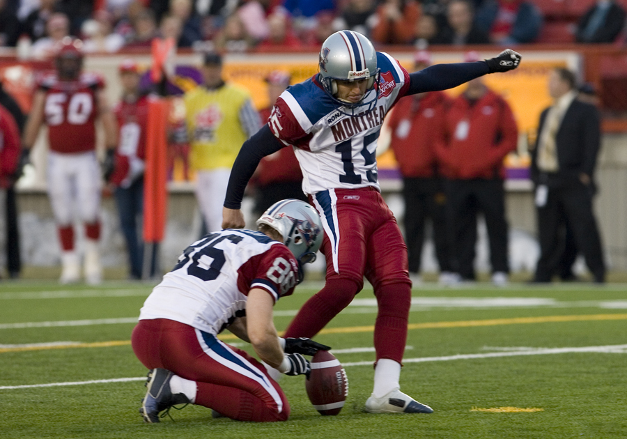 Field Goal Attempt - Tentative de placement